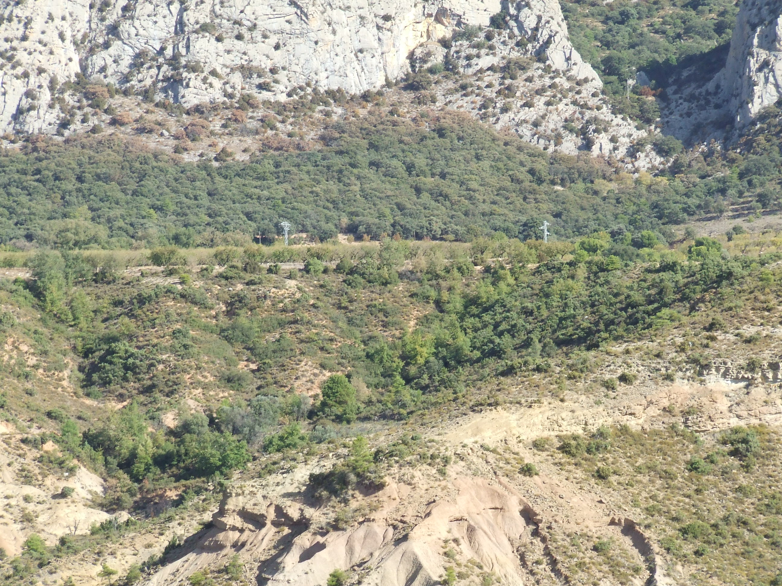 El Coll de la Torre (Abella de la Conca, Pallars Jussà)